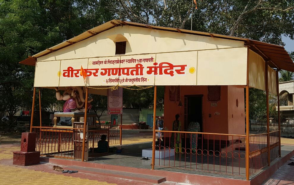 वीरकर गणपती